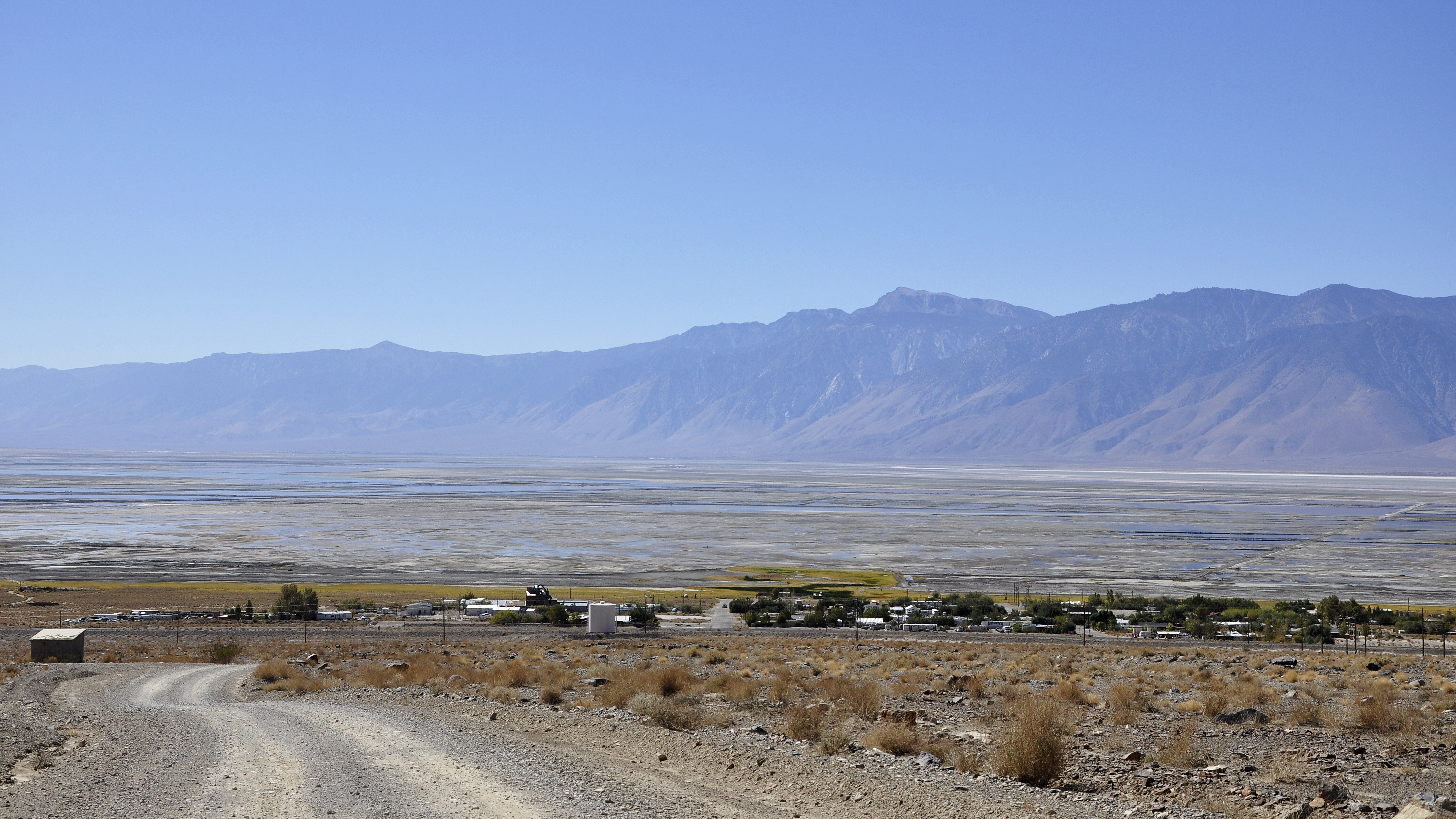 Keeler op de voorgrond en Owens Lake, Californië